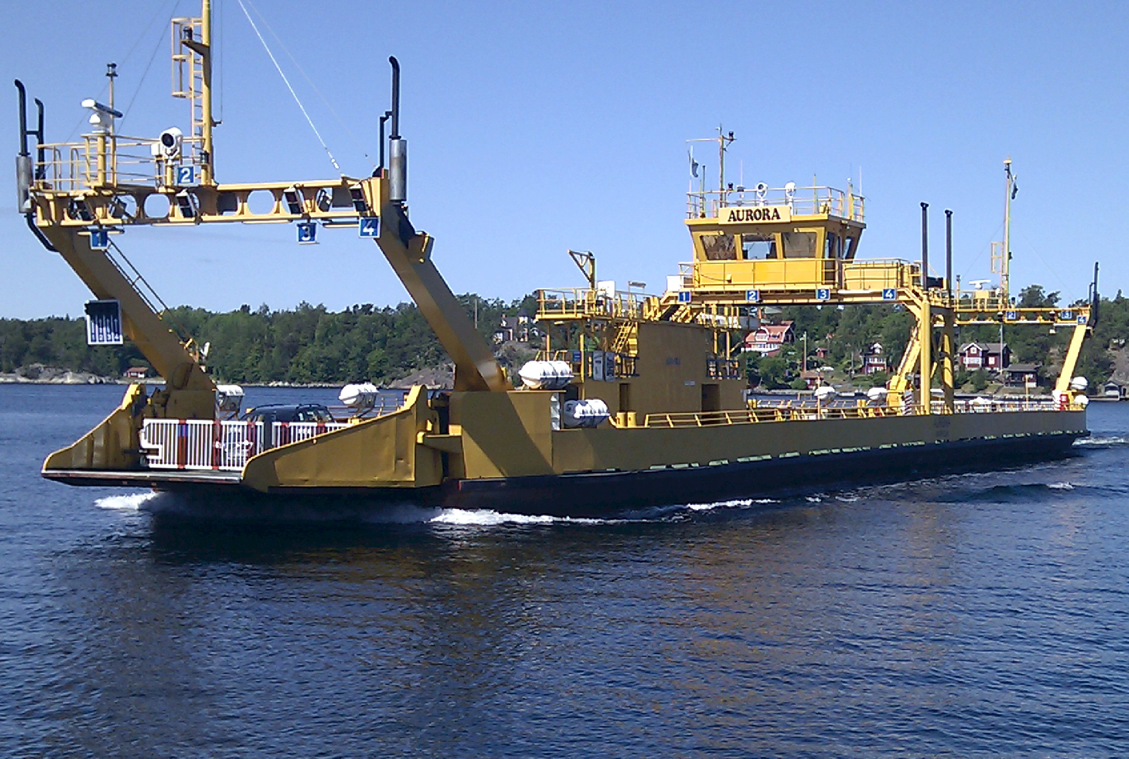 Bilfärjan Aurora